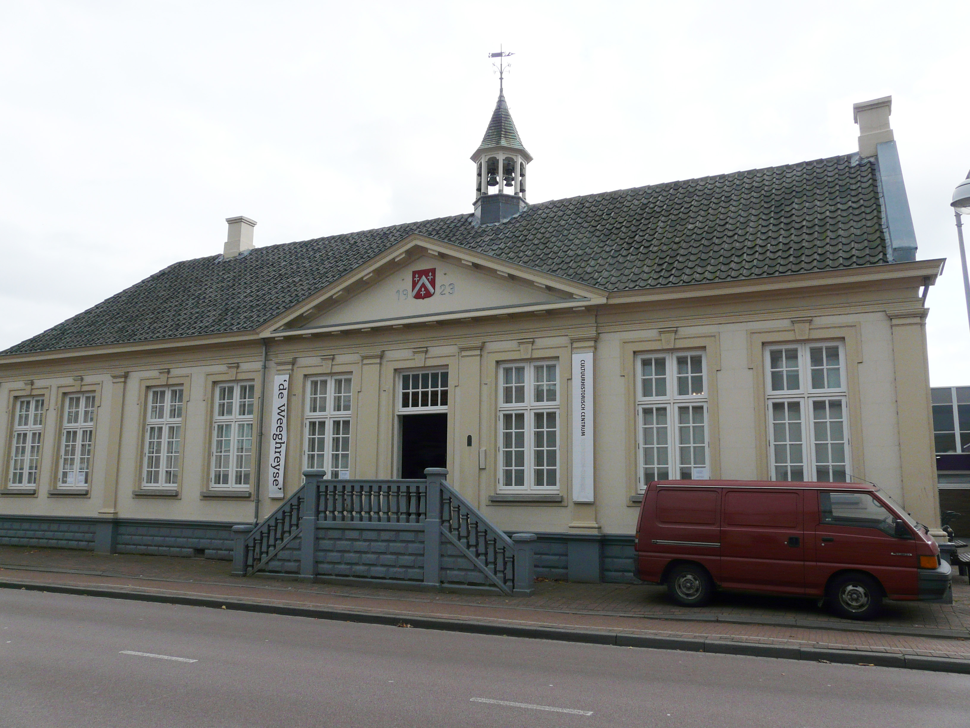 Cultureel centrum in Rijsbergen, voormalig raadhuis